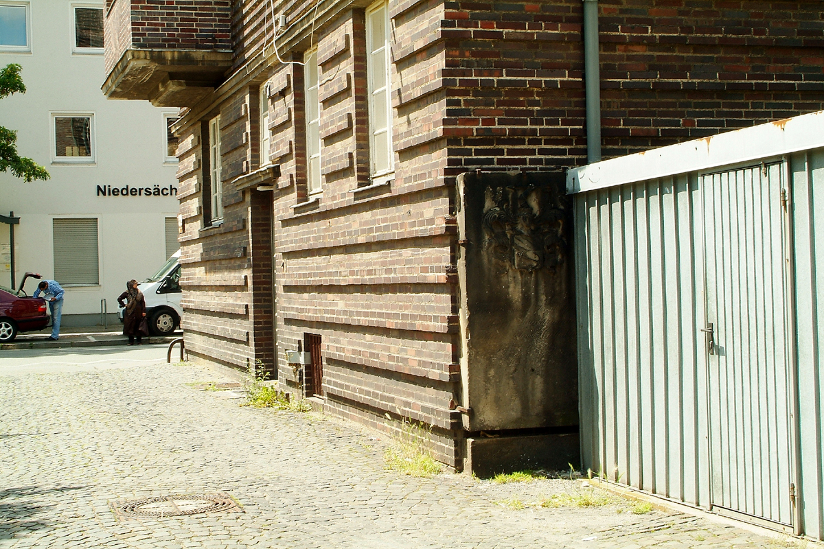 Grabplatte des Franz Edmund Joseph Ignaz / Philipp Bartholomaeus / Freiherr v. Schmitz Grollenburg / ... (?) Regierungspräsident / geboren zu Wetzlar den 24. August 1776 / gestorben zu Hannover den 13. Februar 1844, letzte am Ort des katholischen, ehemaligen St.-Johannis-Friedhofs vor dem Aegidientor erhaltene Grabplatte ...